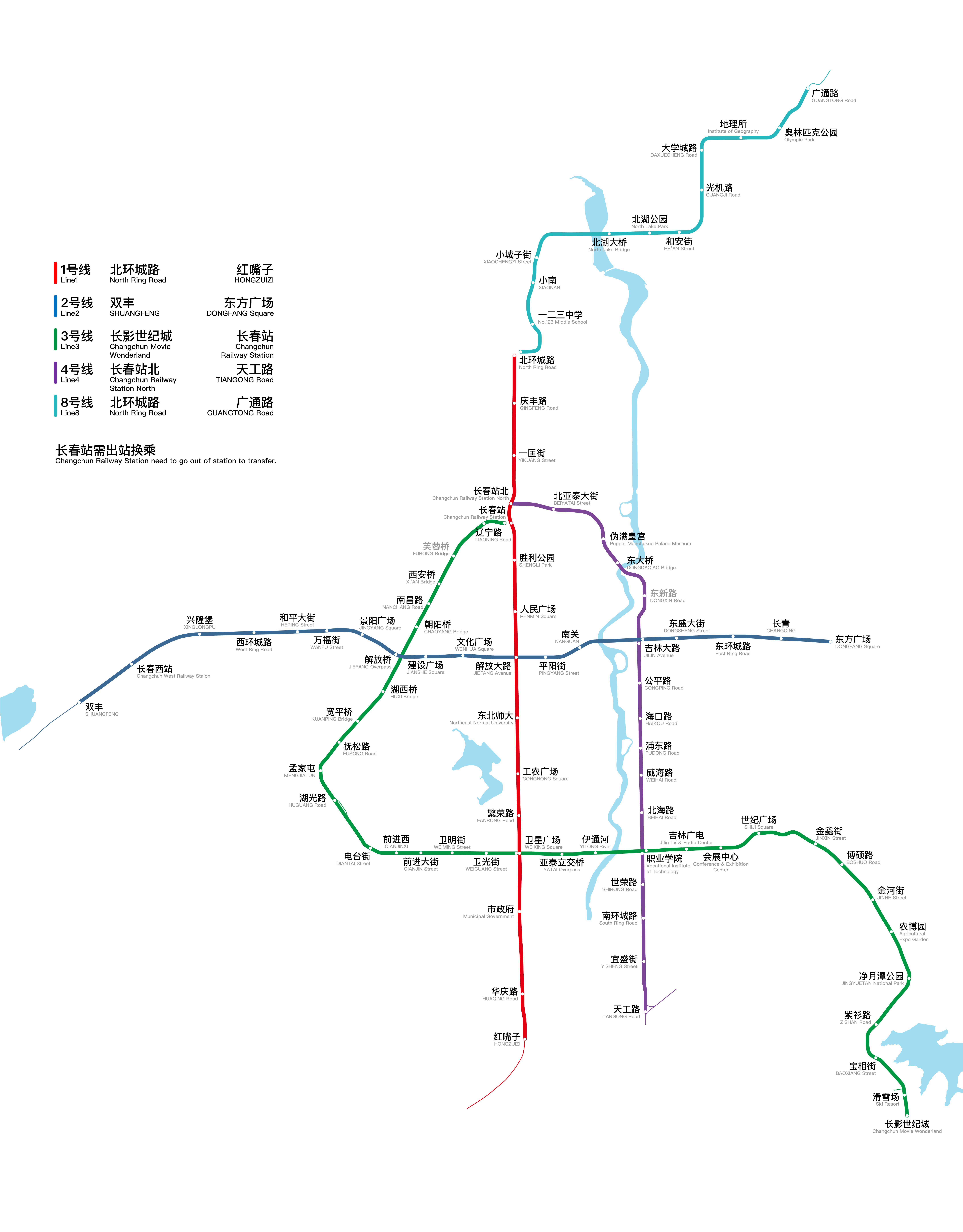 中文（中国大陆）: 长春轨道交通线路图